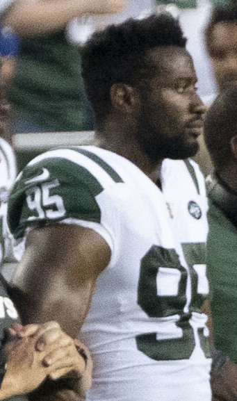 Jets at Redskins 8/16/18